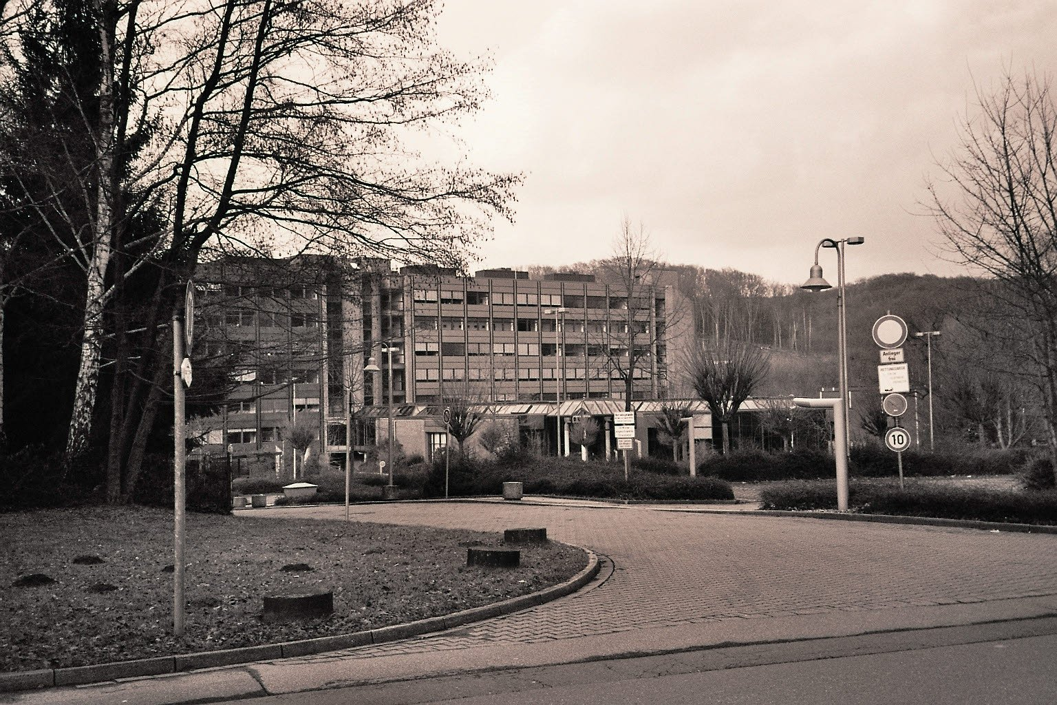 Das Simulatorzentrum der KSG